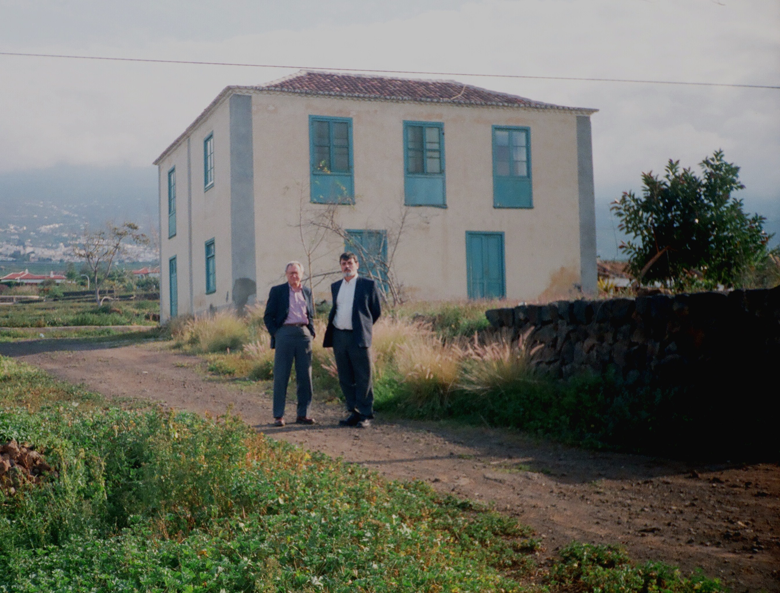 Fuente: Asociación Wolfgang Köhler